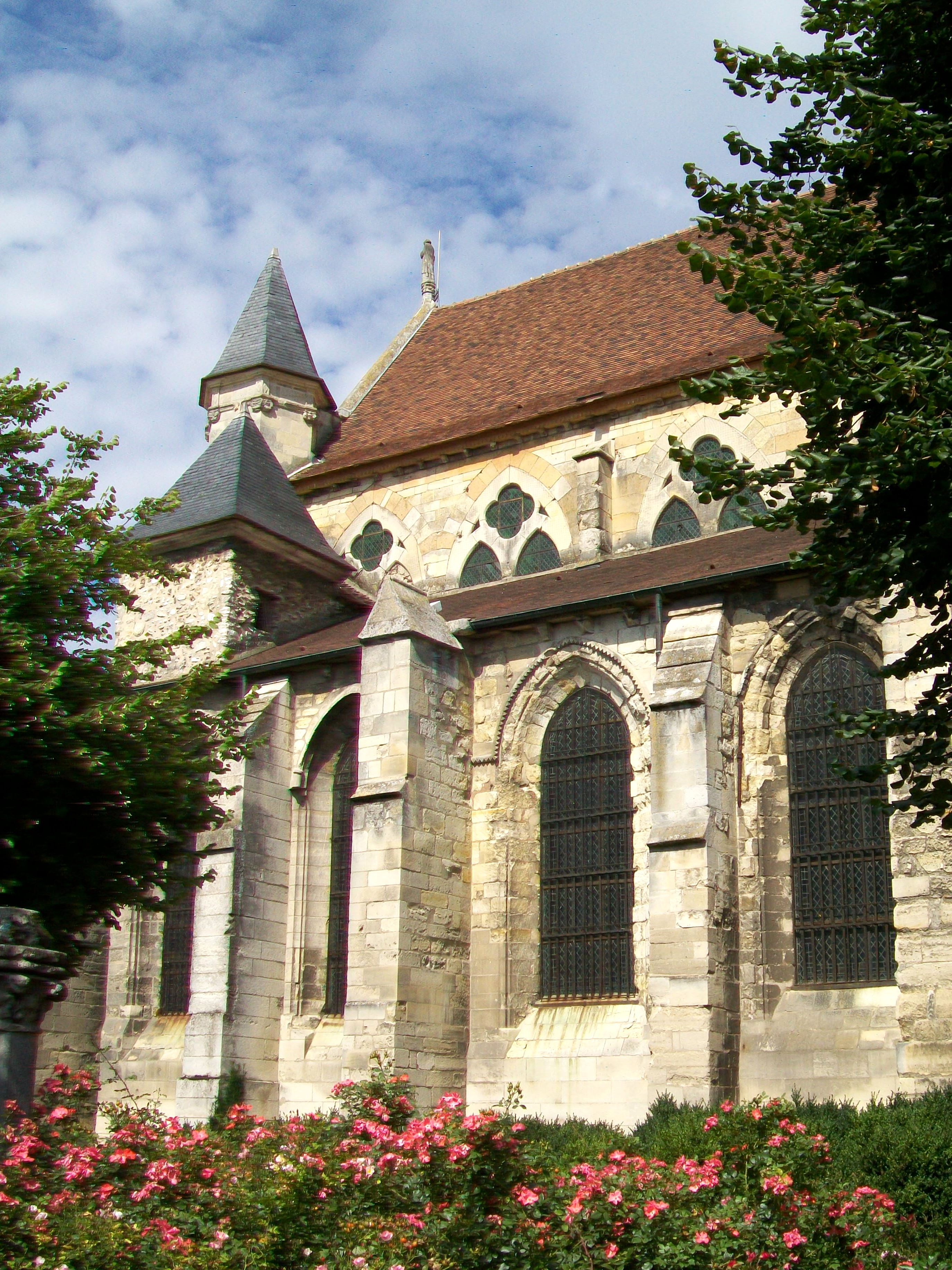 Les premières des huit travées de la nef et du bas-côté sud, depuis le jardin de l'église.